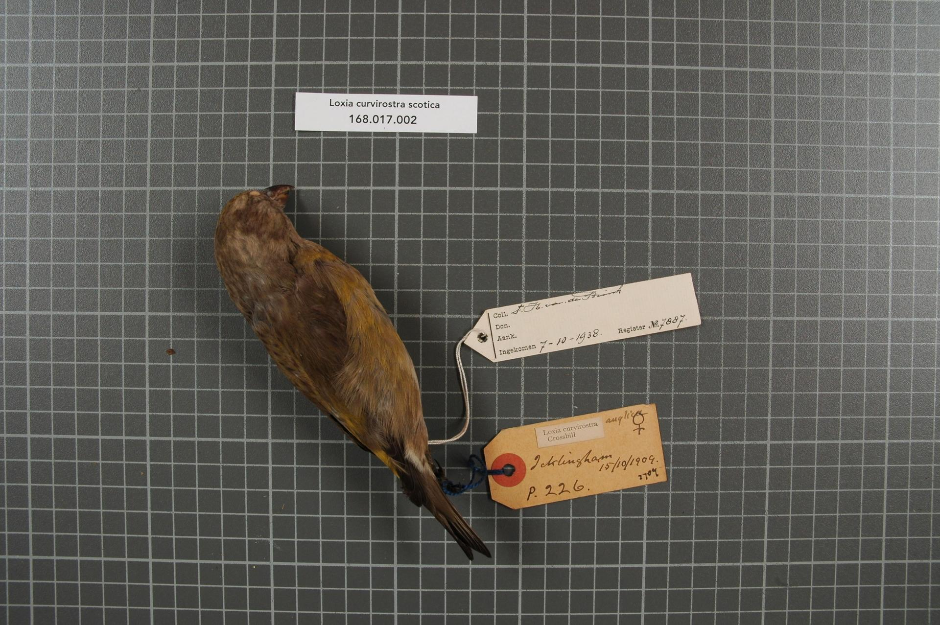 Loxia curvirostra scotica Hartert, 1904